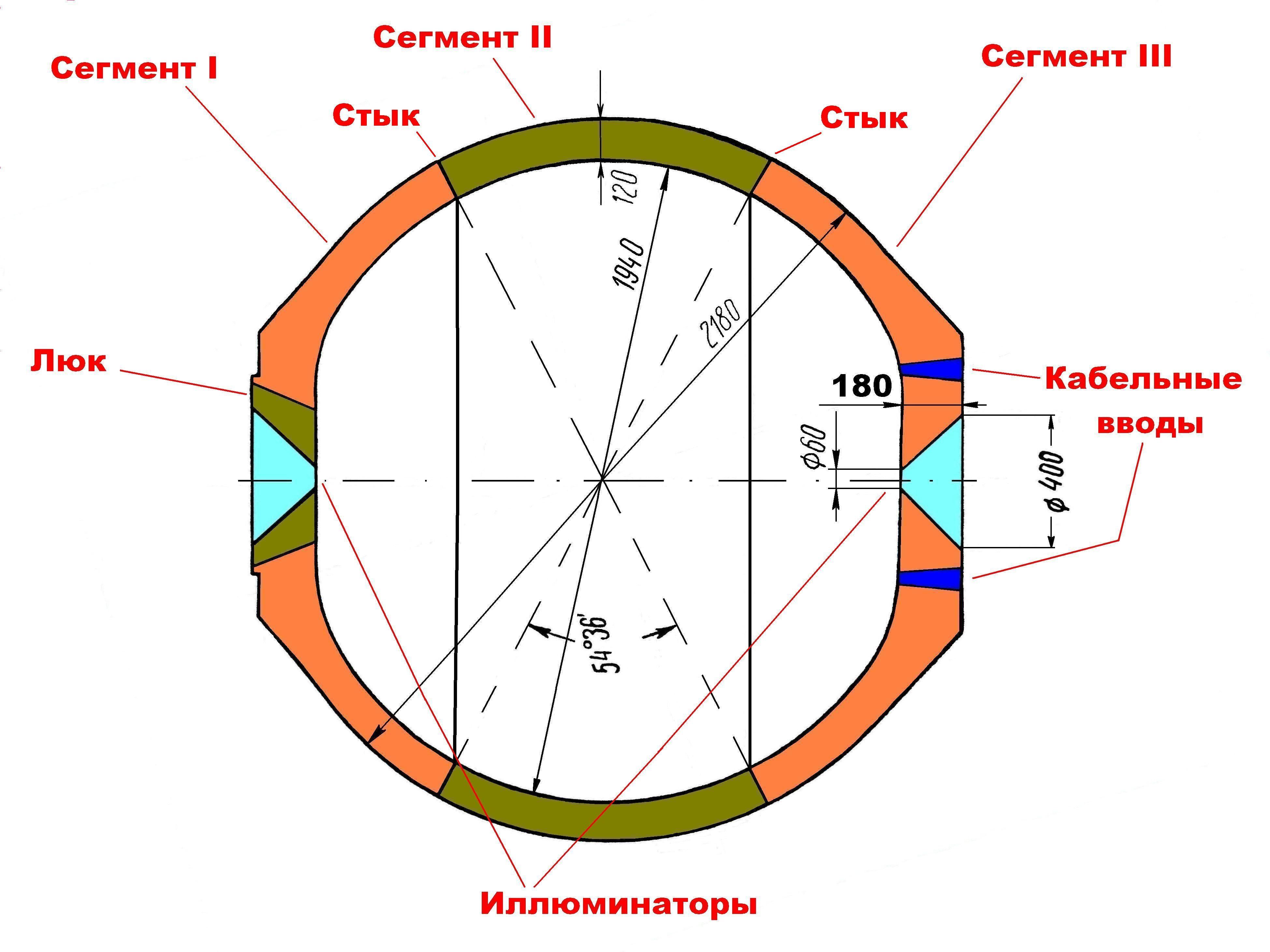 Trieste (submarine, 1953)